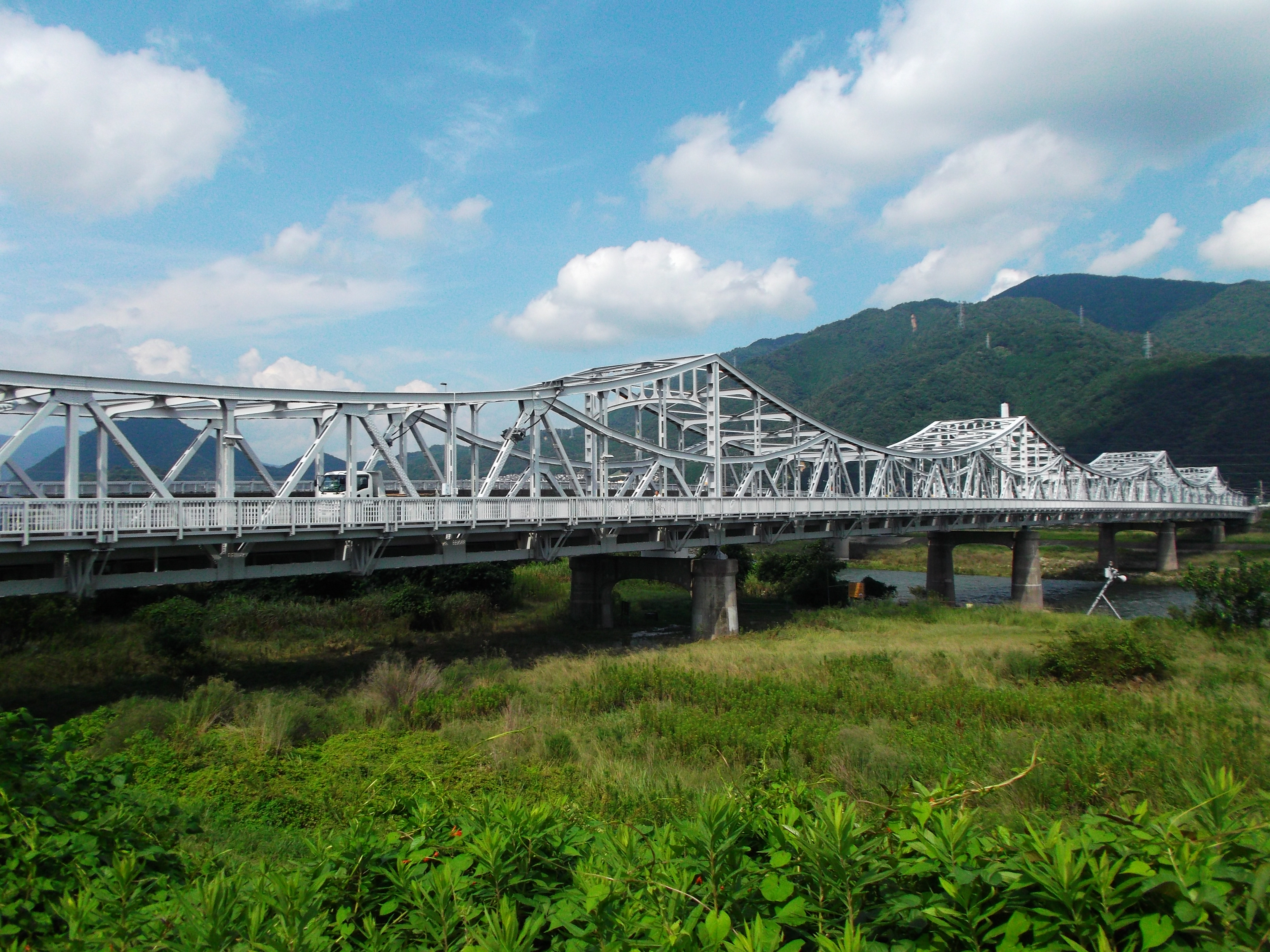 太田川橋